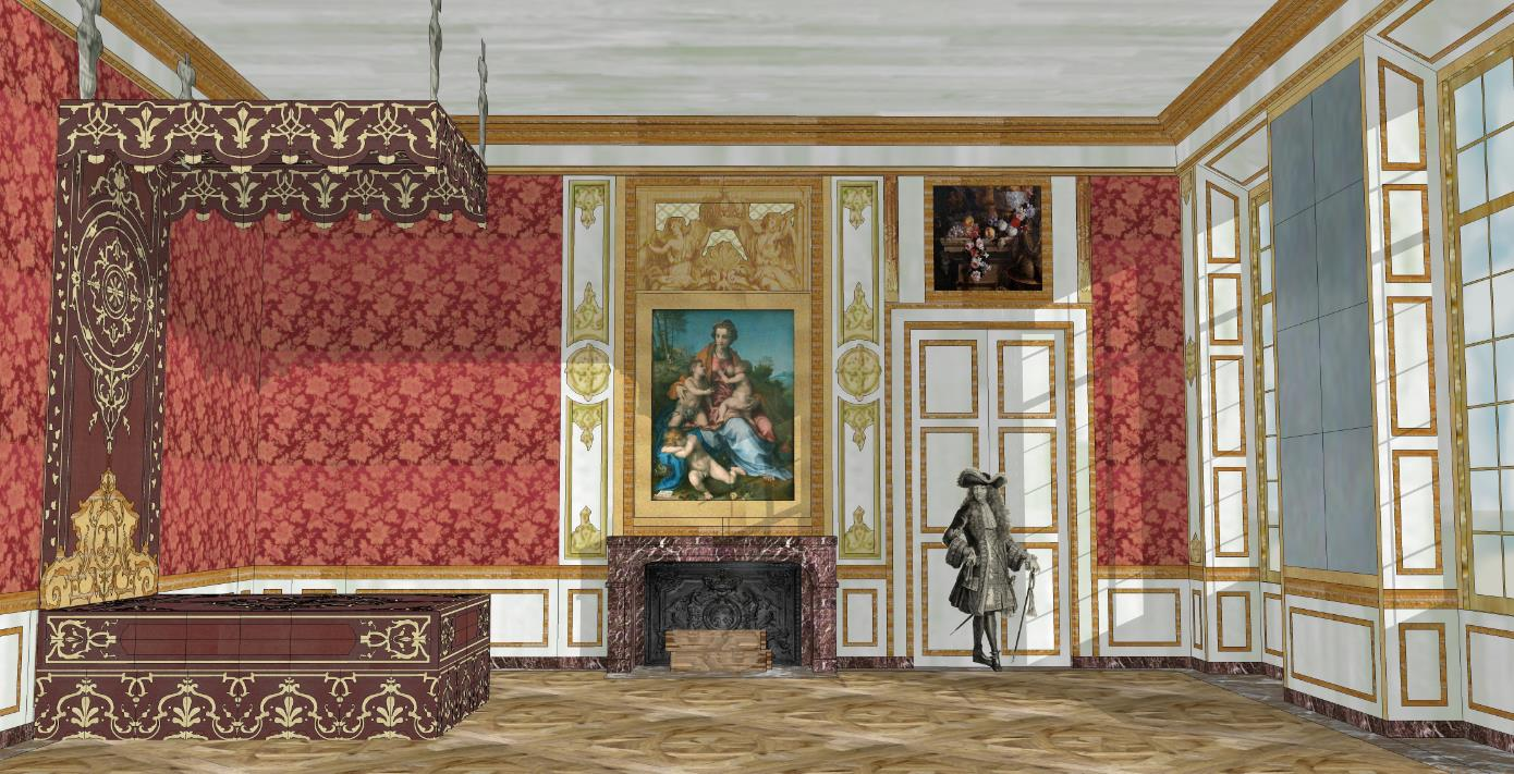 Proposition de restitution de la chambre de Louis XIV au château-vieux de Meudon, vers 1700.